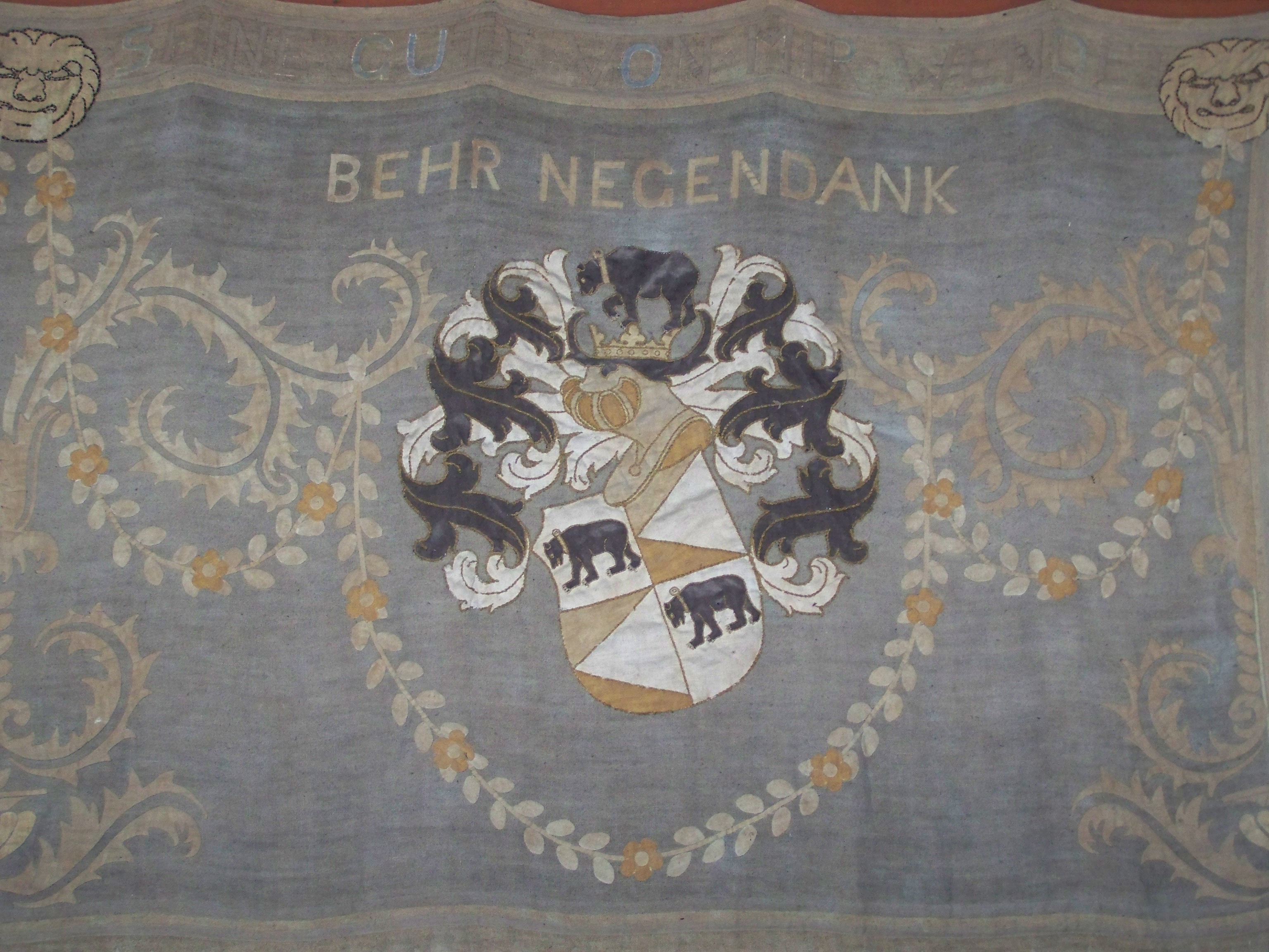 Brandshagen, Nordvorpommern, Dorfkirche, Behr-Negendank